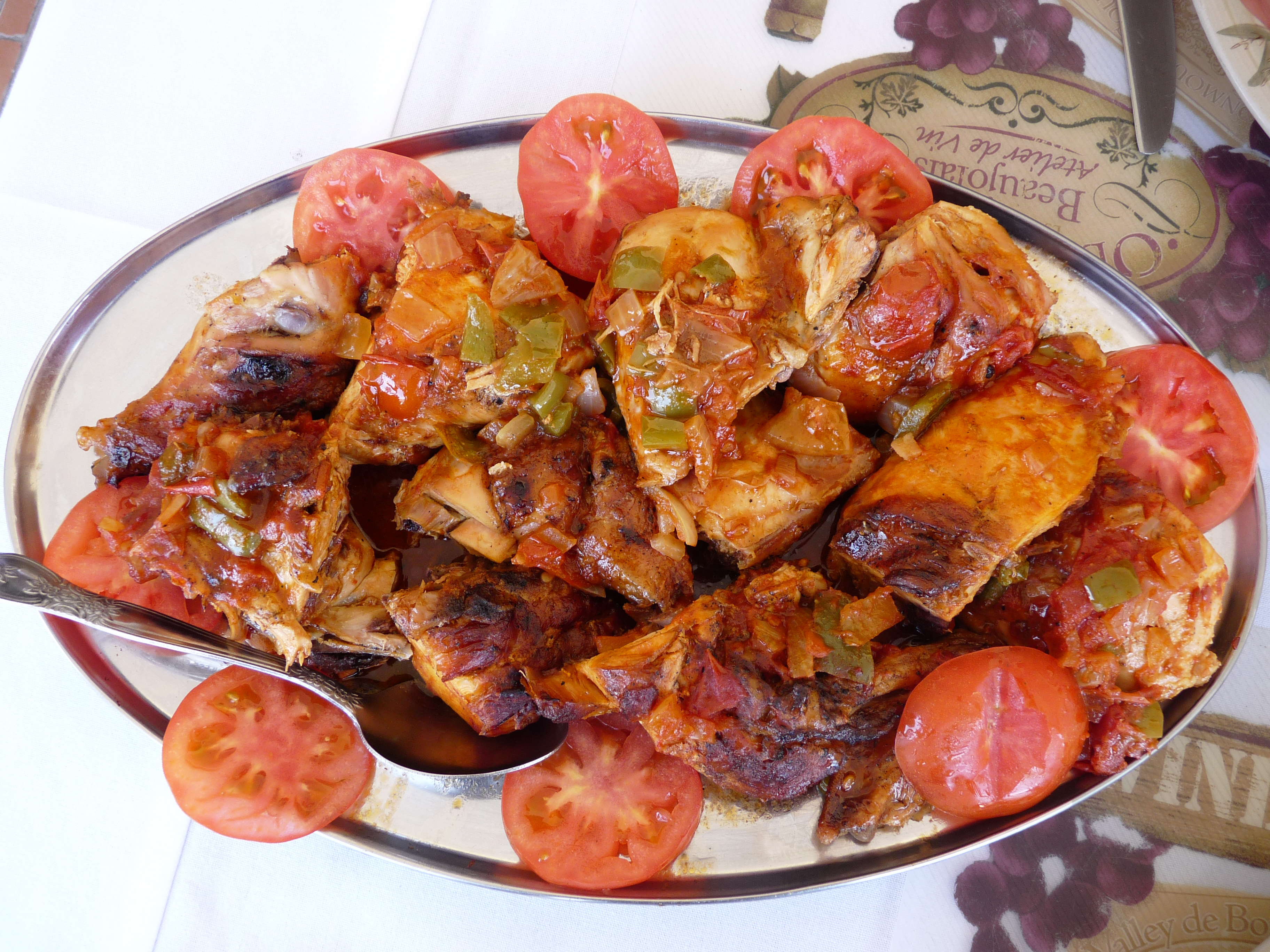 São Filipe (île de Fogo, Cap-Vert) : plat à base de poulet